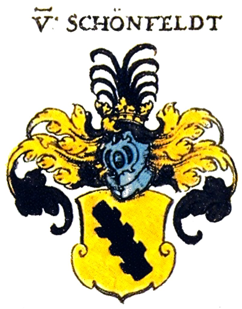 Wappen der Thüringischen Adelsfamilie Schönfeld